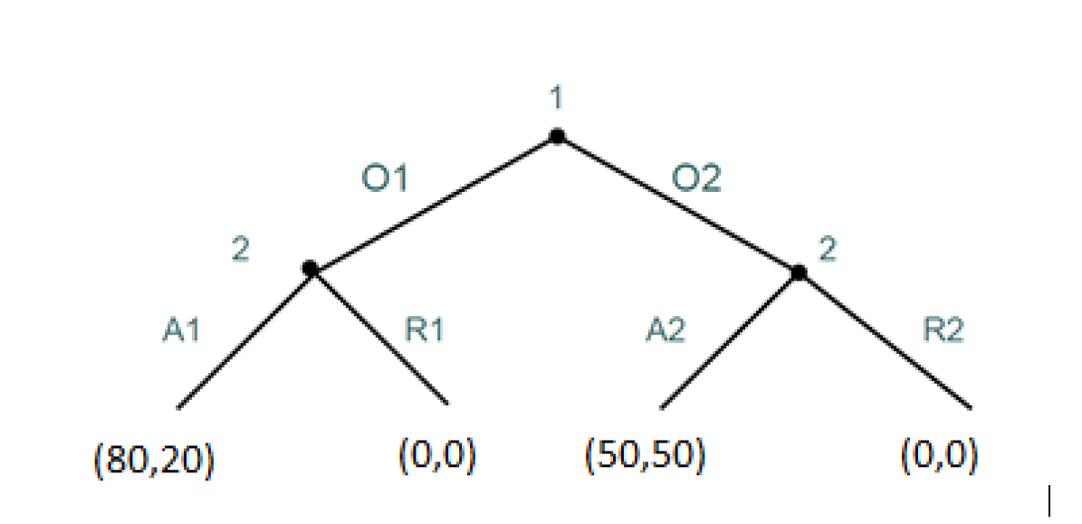 Minijuego del Ultimatum